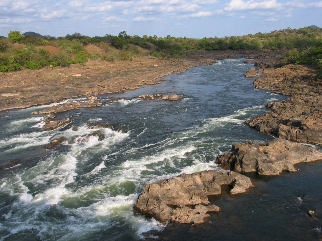 Cuanza bei Dondo in der Provinz Cuanza Norte, Angola